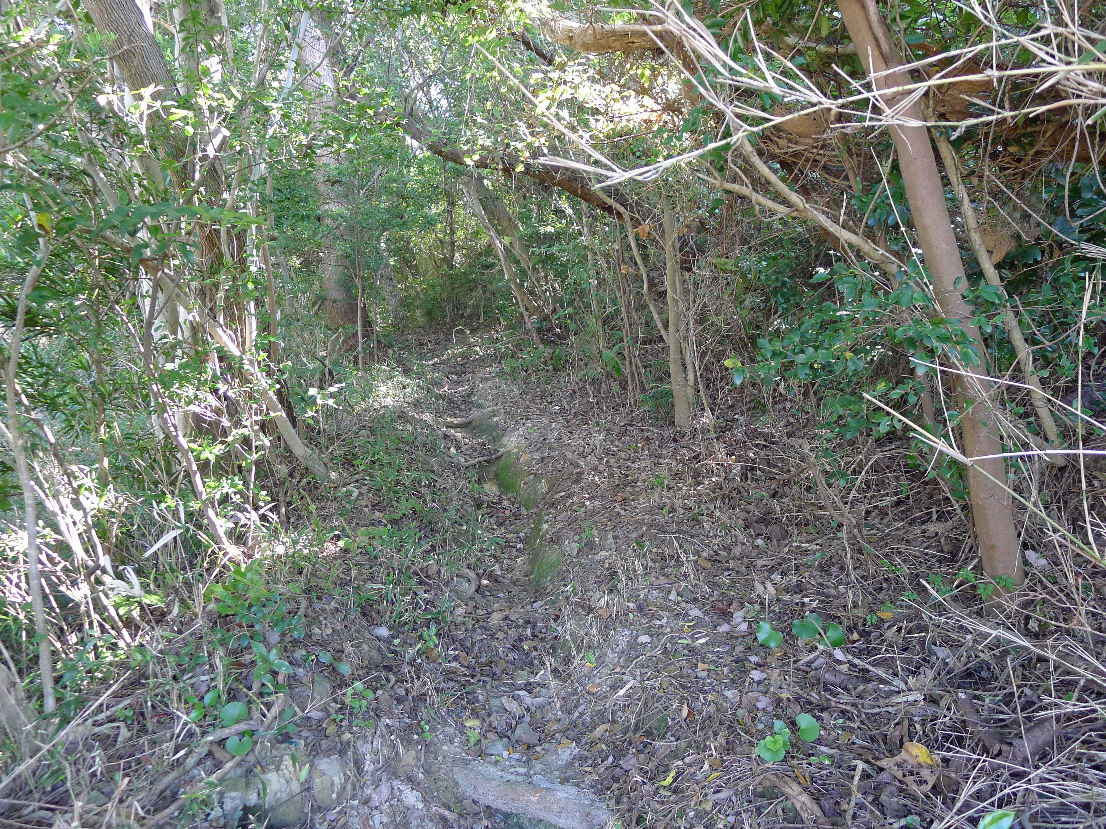 熊野古道紀伊路（和歌山県みなべ町）